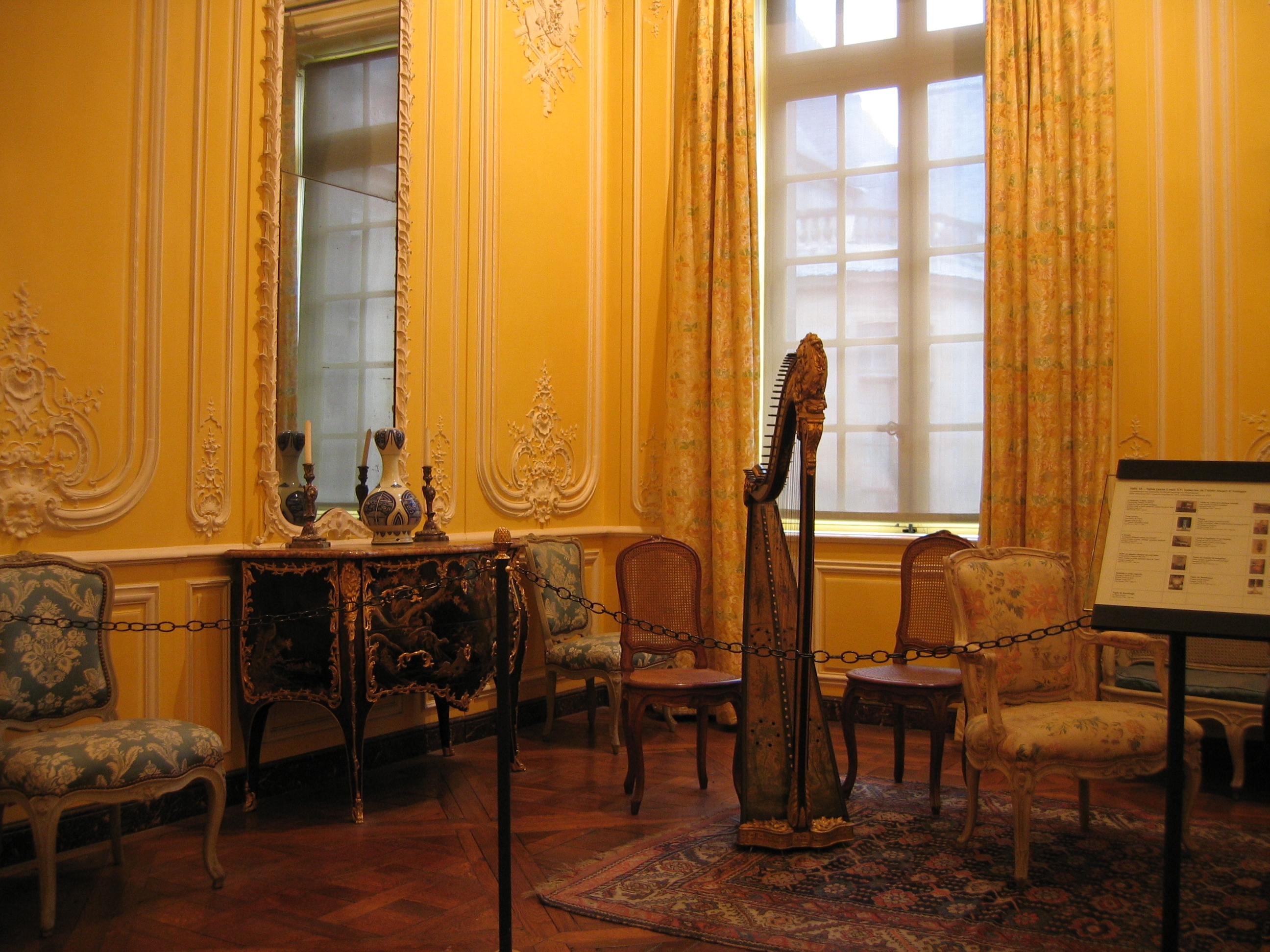 Le musée Carnavalet à Paris, ce dernier retrace l'histoire de la ville de Paris